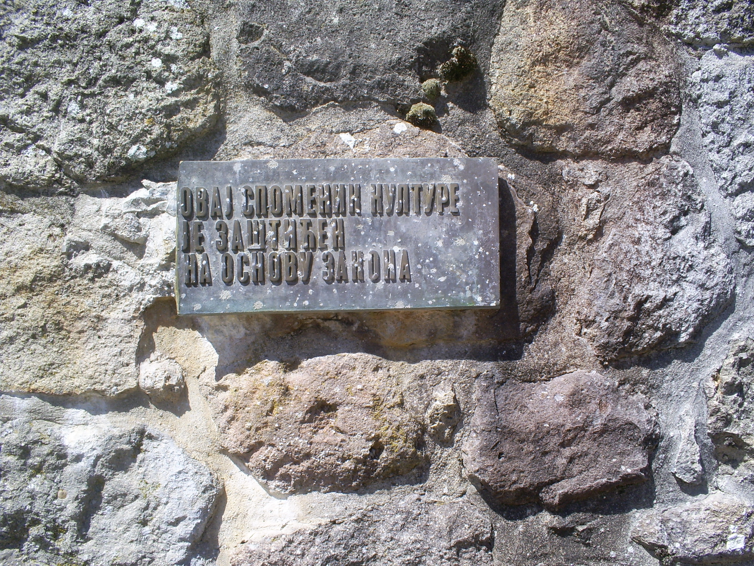 Tabla na ulazu u manastir Djurdjevi stupovi